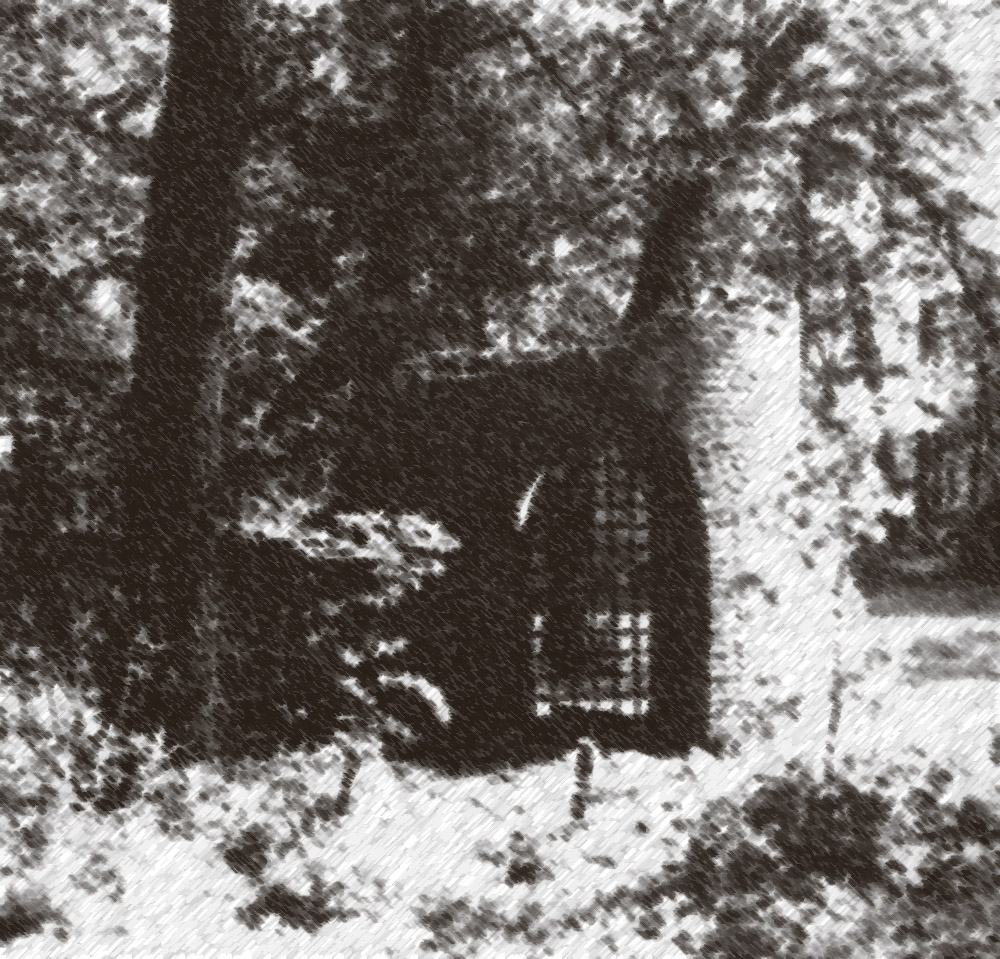 Park Klein-Glienicke, Ruine des Kugelfangs, Foto 1950, verfremdete Darstellung